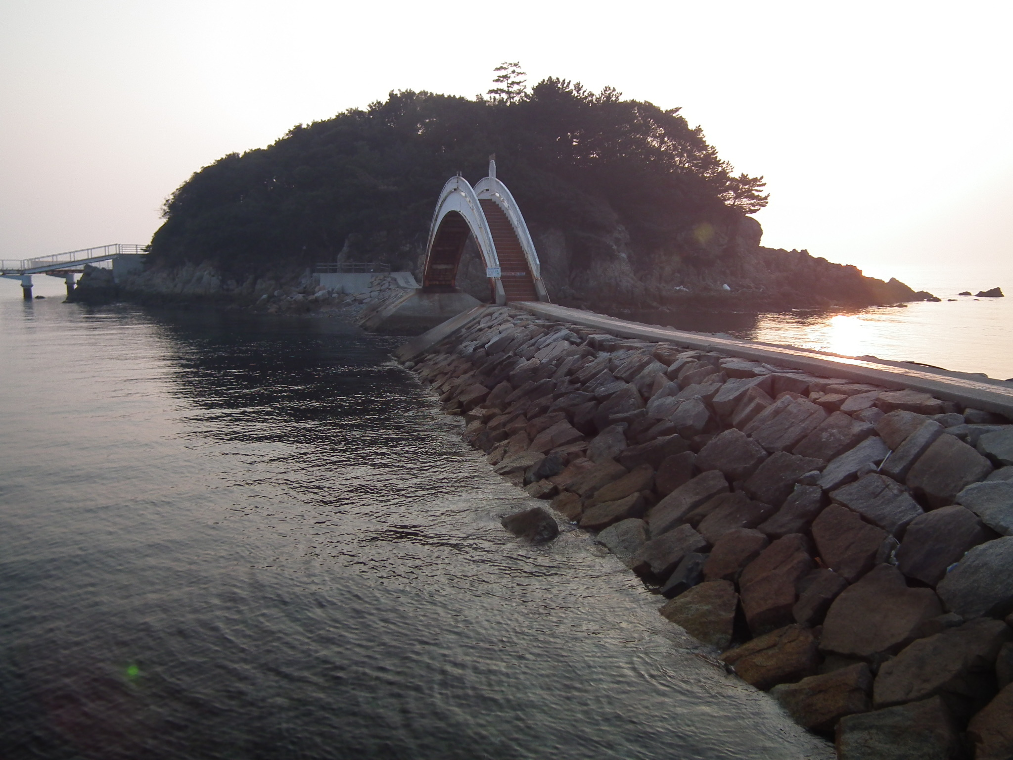 Benten-island MinamiAwaji-city 弁天島南あわじ市